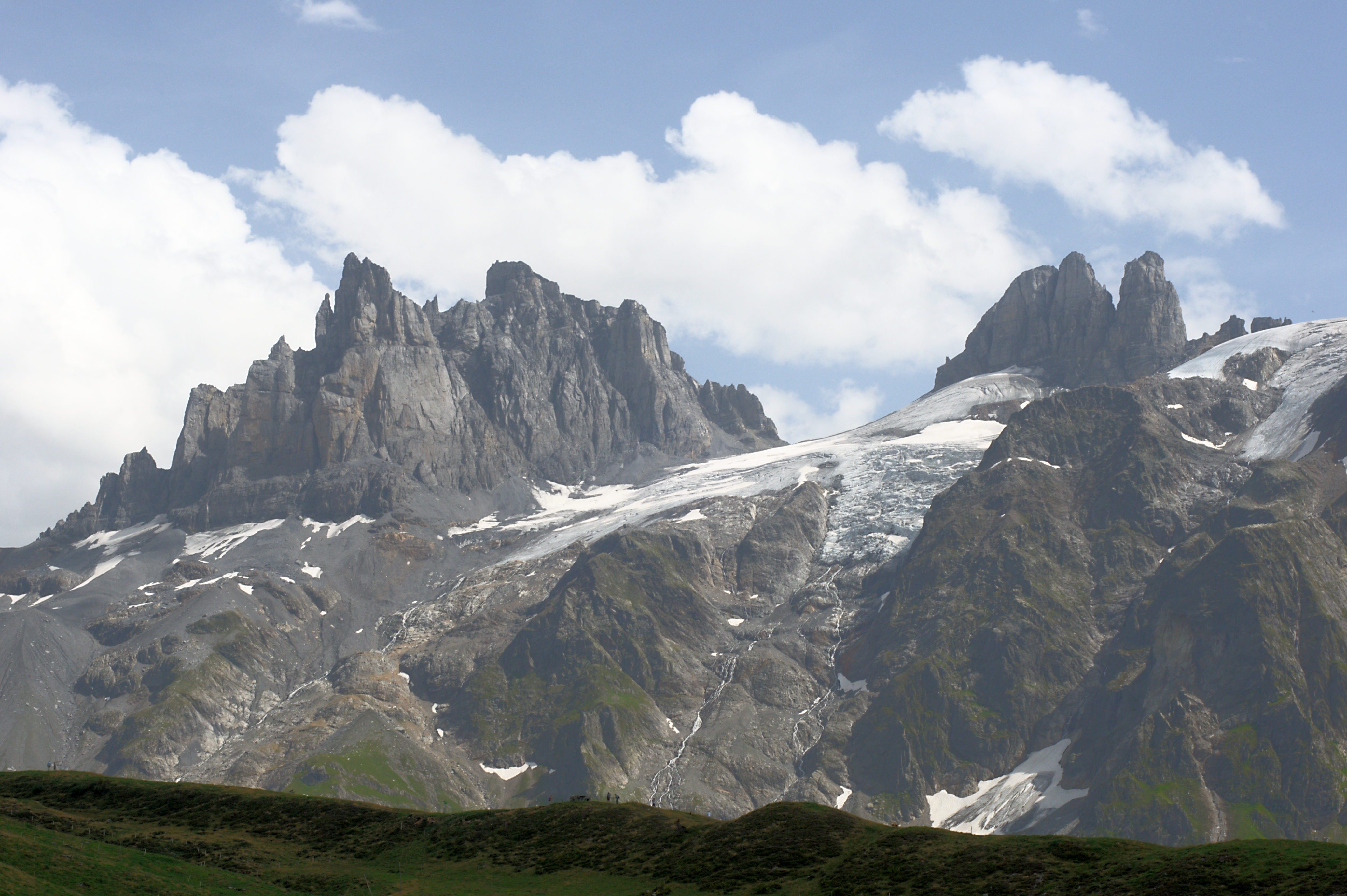 Gross und Chli Spannort, von Fürenalp aus gesehen.